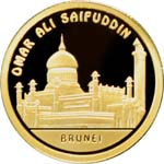 Памятная монета Республики Казахстан - Серия "Знаменитые мечети мира" Бруней 2011 - реверс - 500 тенге - золото